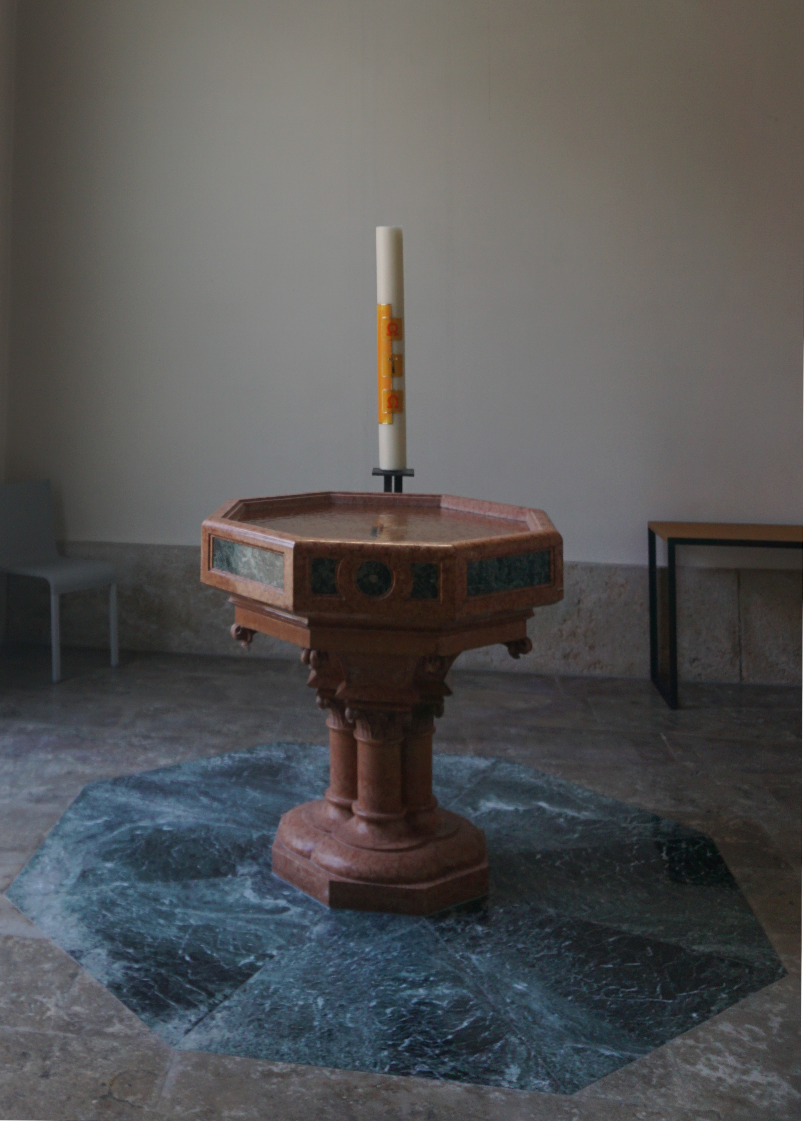 Saint-Martin Taufstein in rotem und blauem Marmor